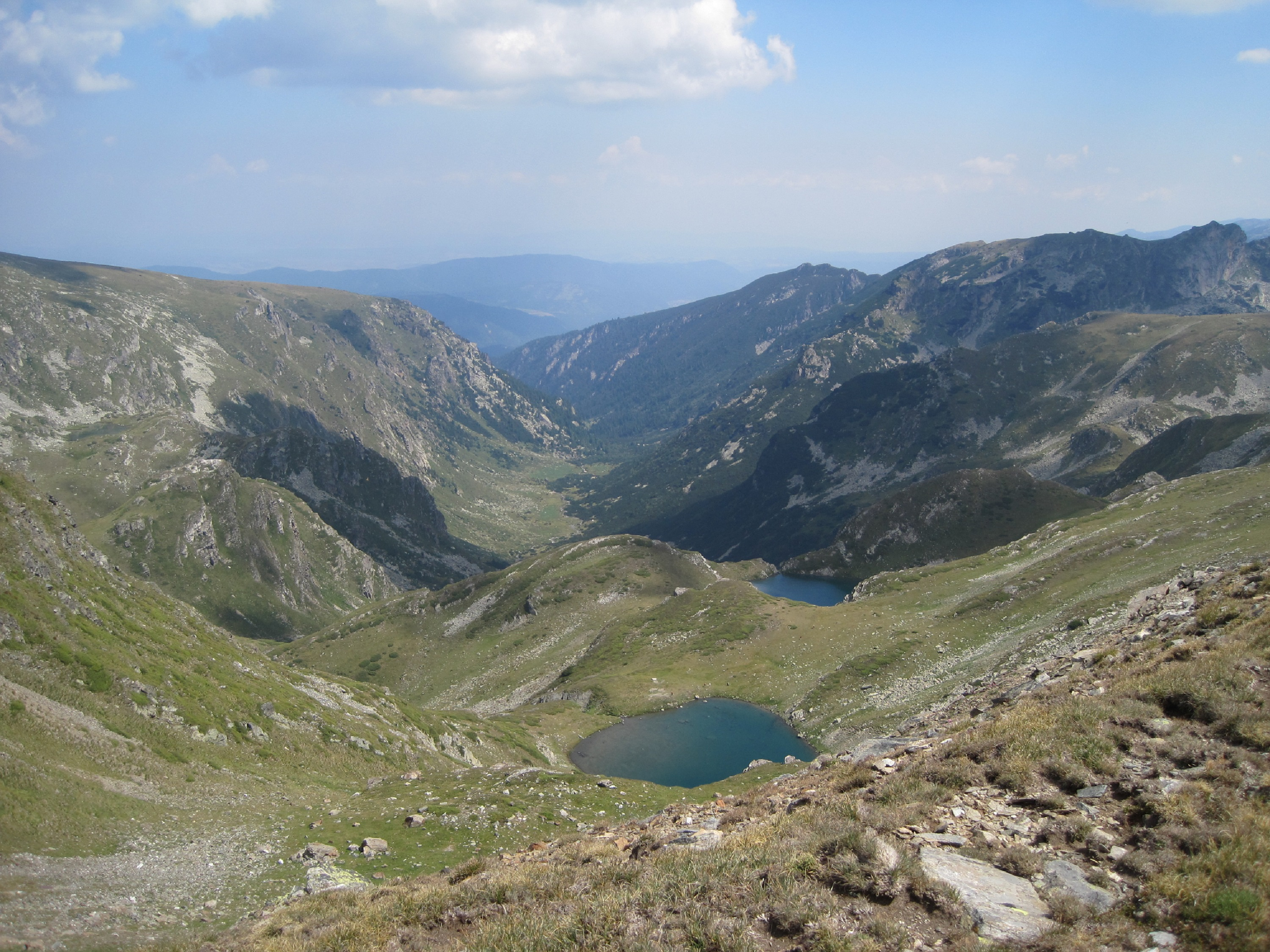 Урдини езера и долината на Урдината река